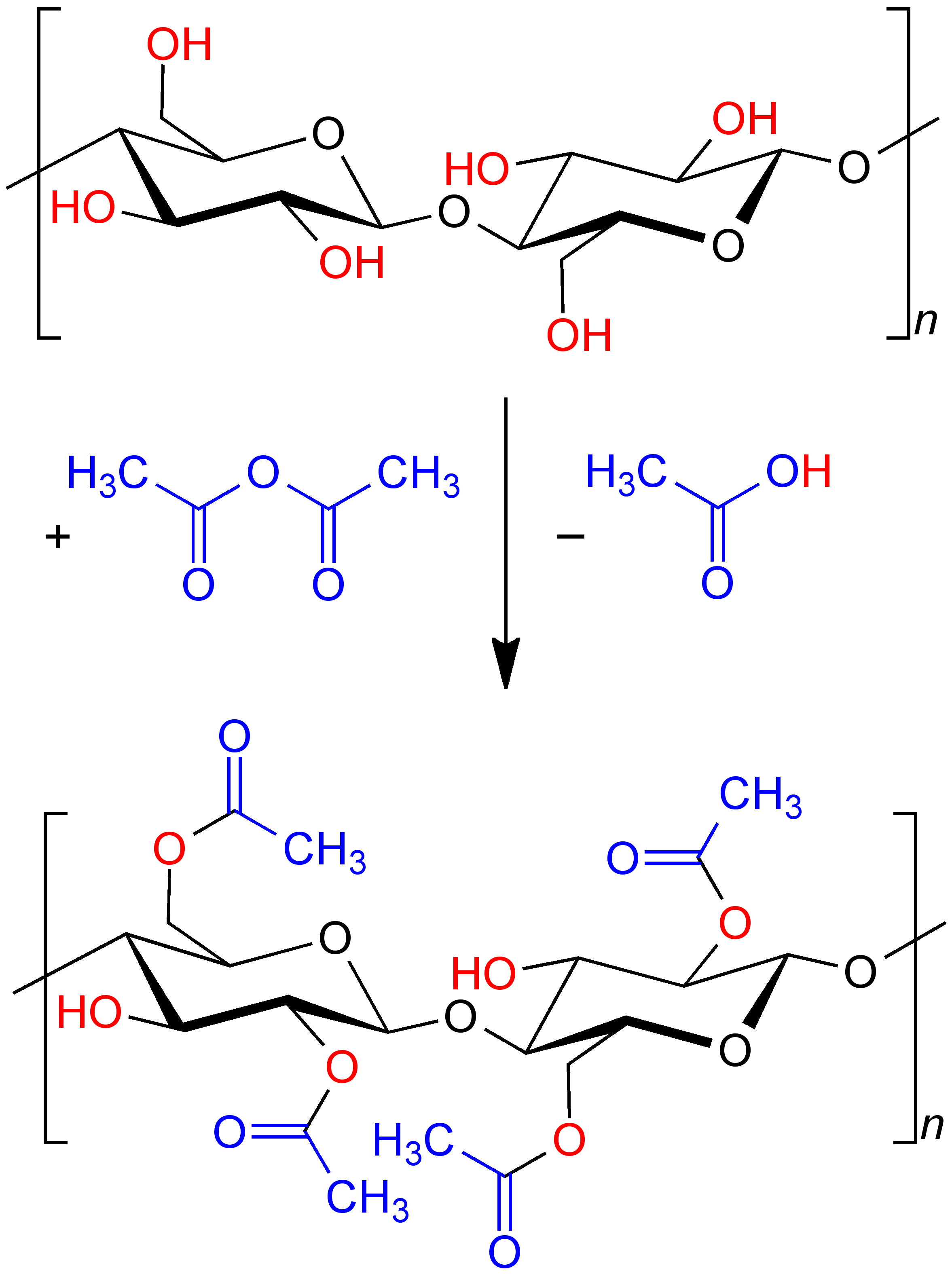 Herstellung von Celluloseacetat (schematisch)